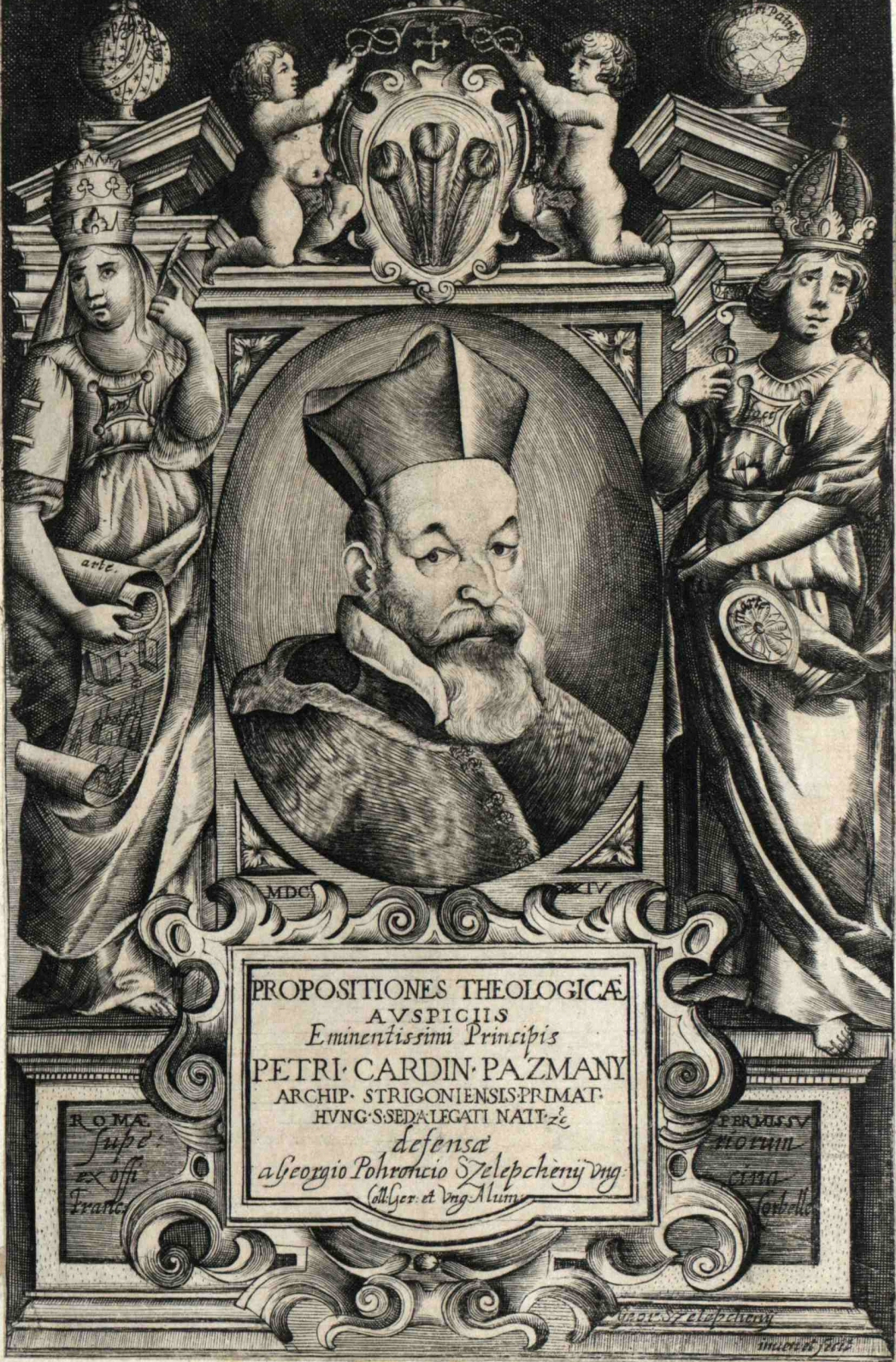 Pázmány, Peter (1570 - 1637)